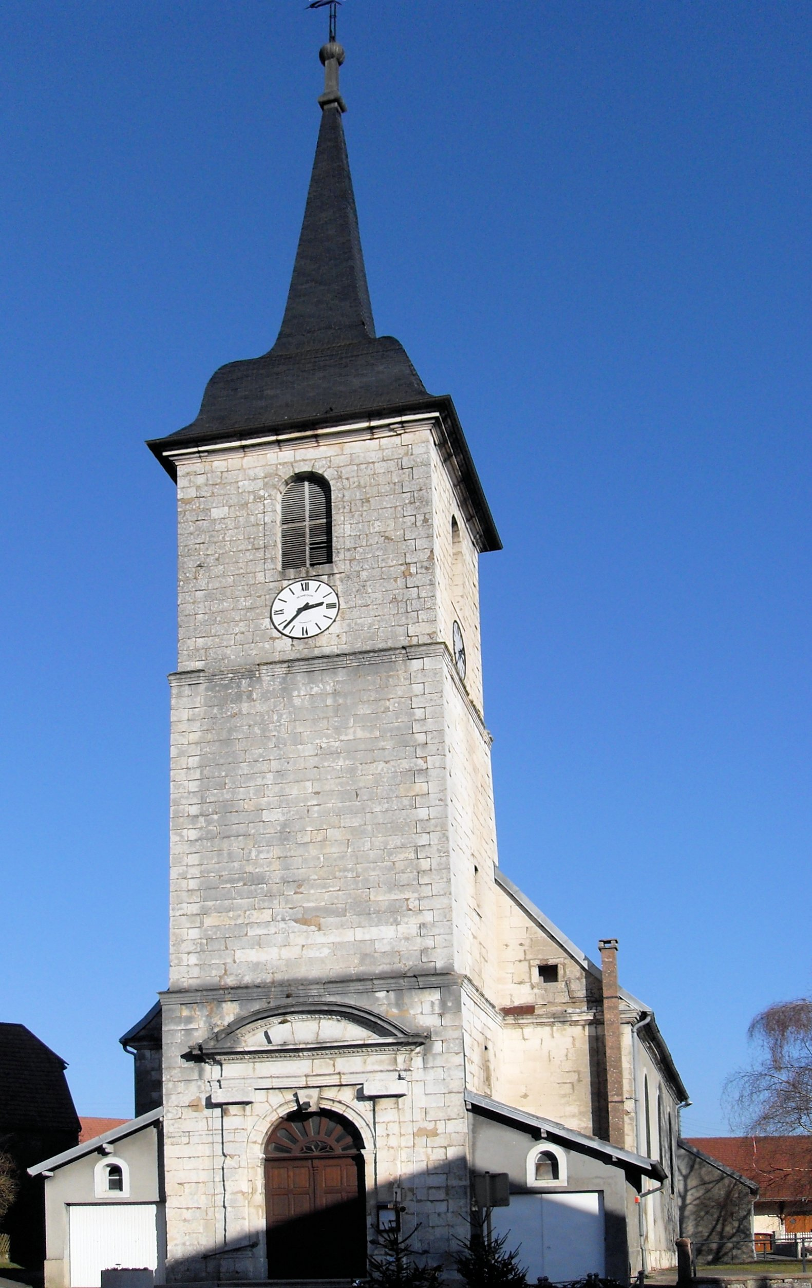 L'église Saint-Mathieu à Pérouse, côté ouest